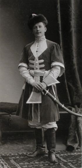 Граф, гвардии штабс-ротмистр Кавалергардского императрицы Марии Федоровны полка А.А.Игнатьев в наряде стрельца Стремянного приказа времен царя Алексея Михайловича